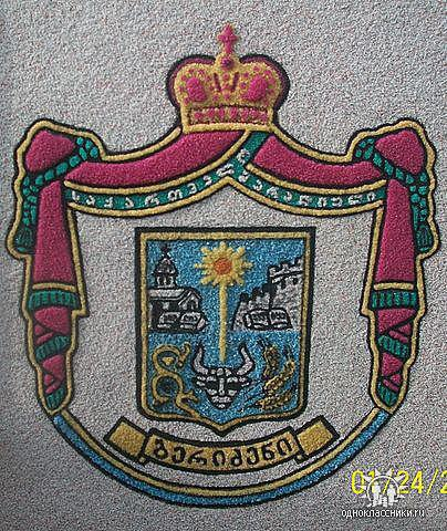 გენელოგია